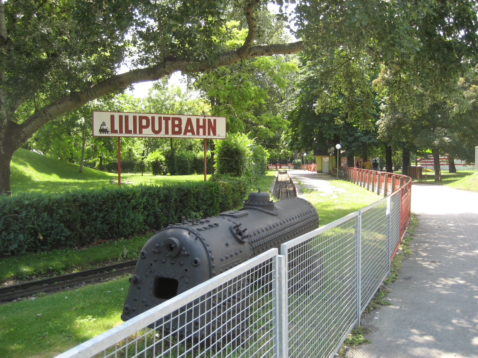 Liliputbahn in Wien, Station Prater-Hauptbahnhof